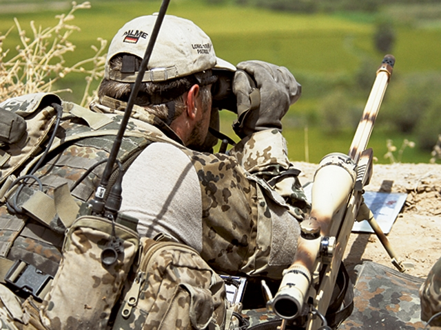 Auf Beobachtungsposten auf der Westplatte